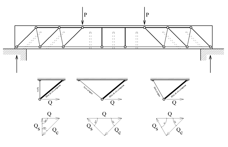 Schema grafico del traliccio di Mörsch